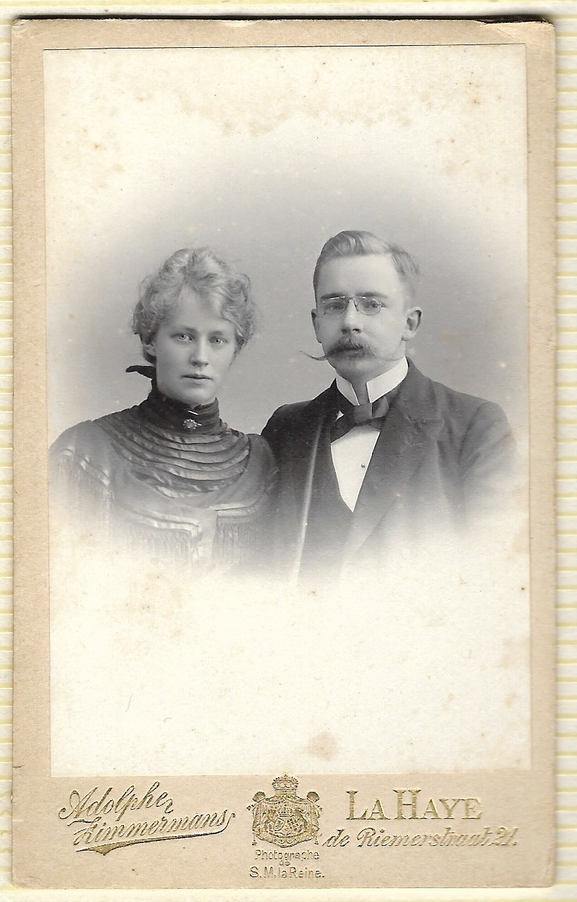 portret van advocaat J.H. Telders (1876-1937) en Theresia (Therry) Kindermann rondom hun huwelijk in 1902. Uit eigen prive-collectie familie.